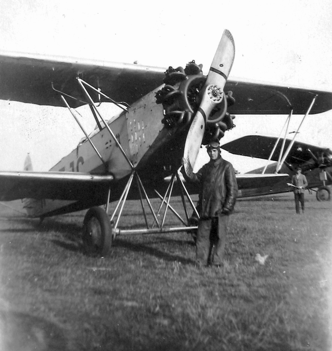 Fokker C.V.D típusú felderítő repülőgép (Weiss Manfréd gyártmány). Háttérben egy Caproni Ca-101 bombázó/szállító repülőgép. Tags: airplane, airport, transport, Royal Hungarian Air Force, Weiss Manfréd-brand, Hungarian brand, license, Caproni-brand, Italian brand, biplane Title: Fokker C.V.D típusú felderítő repülőgép (Weiss Manfréd gyártmány). Háttérben egy Caproni Ca-101 bombázó/szállító repülőgép.